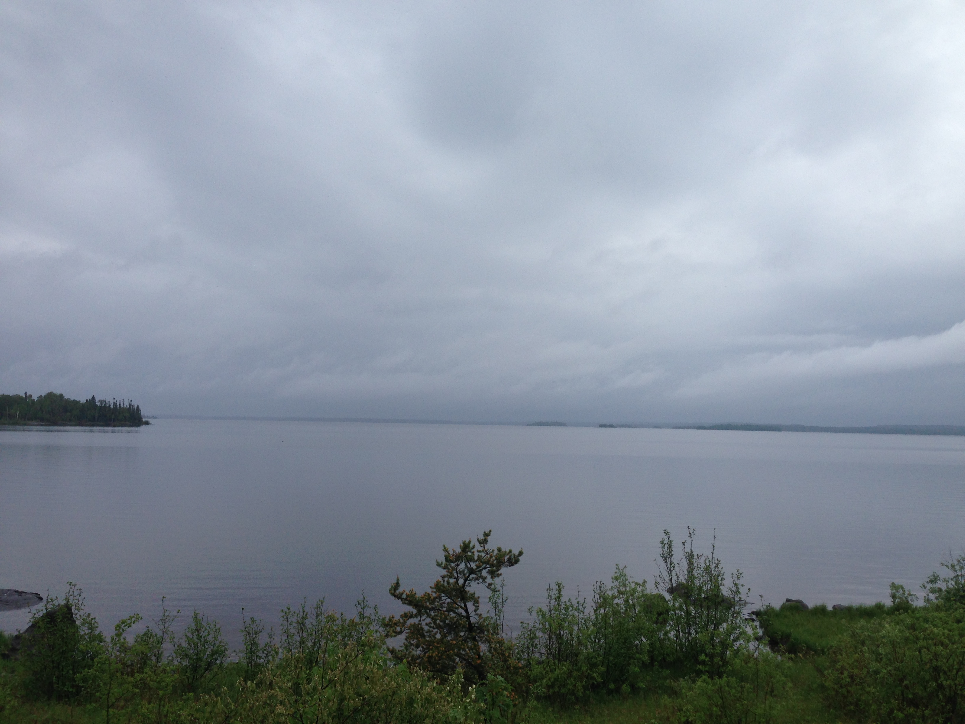 Pakwash Lake, Ontario.